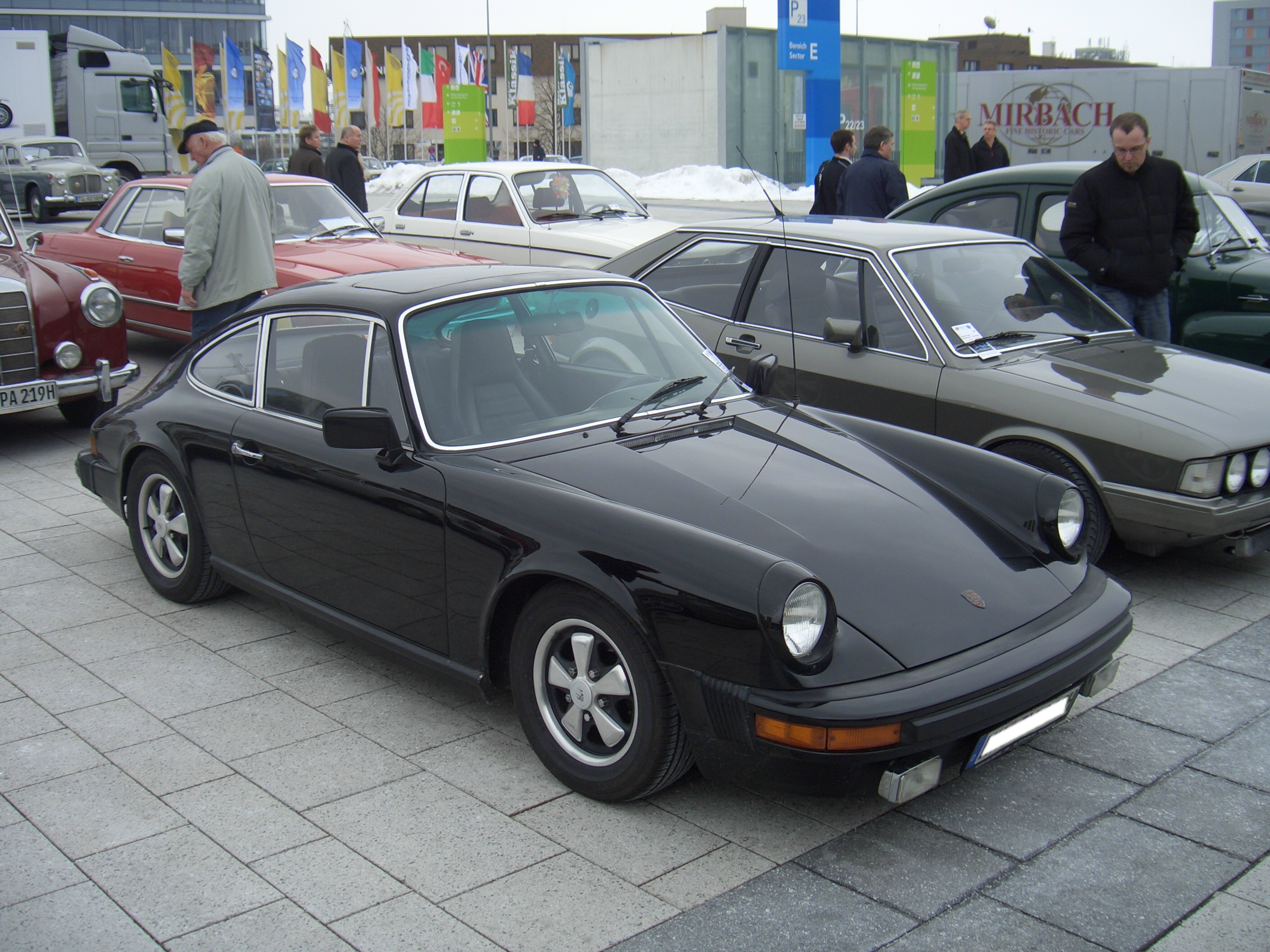 Porsche 912E (US market, 1976)